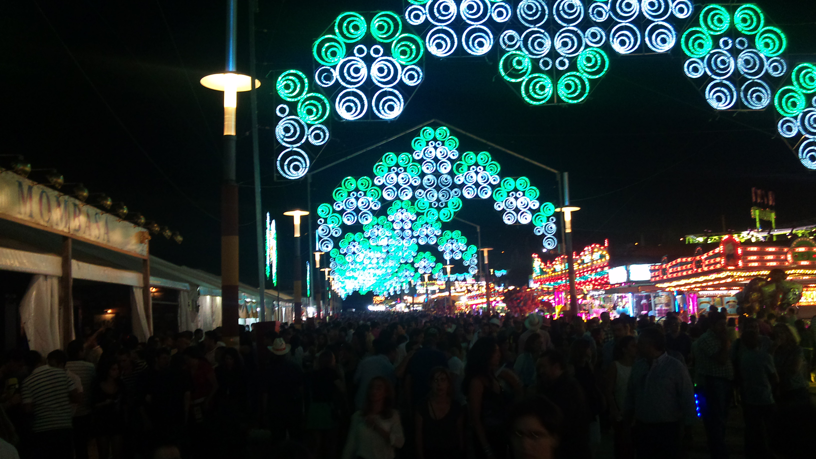 Vista nocturna de la feria de San Lucas 2011, Jaén.